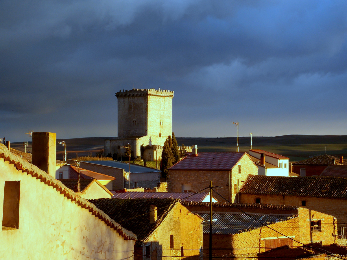 Panorámica de Mazuelo de Muñó con el castillo al fondo.